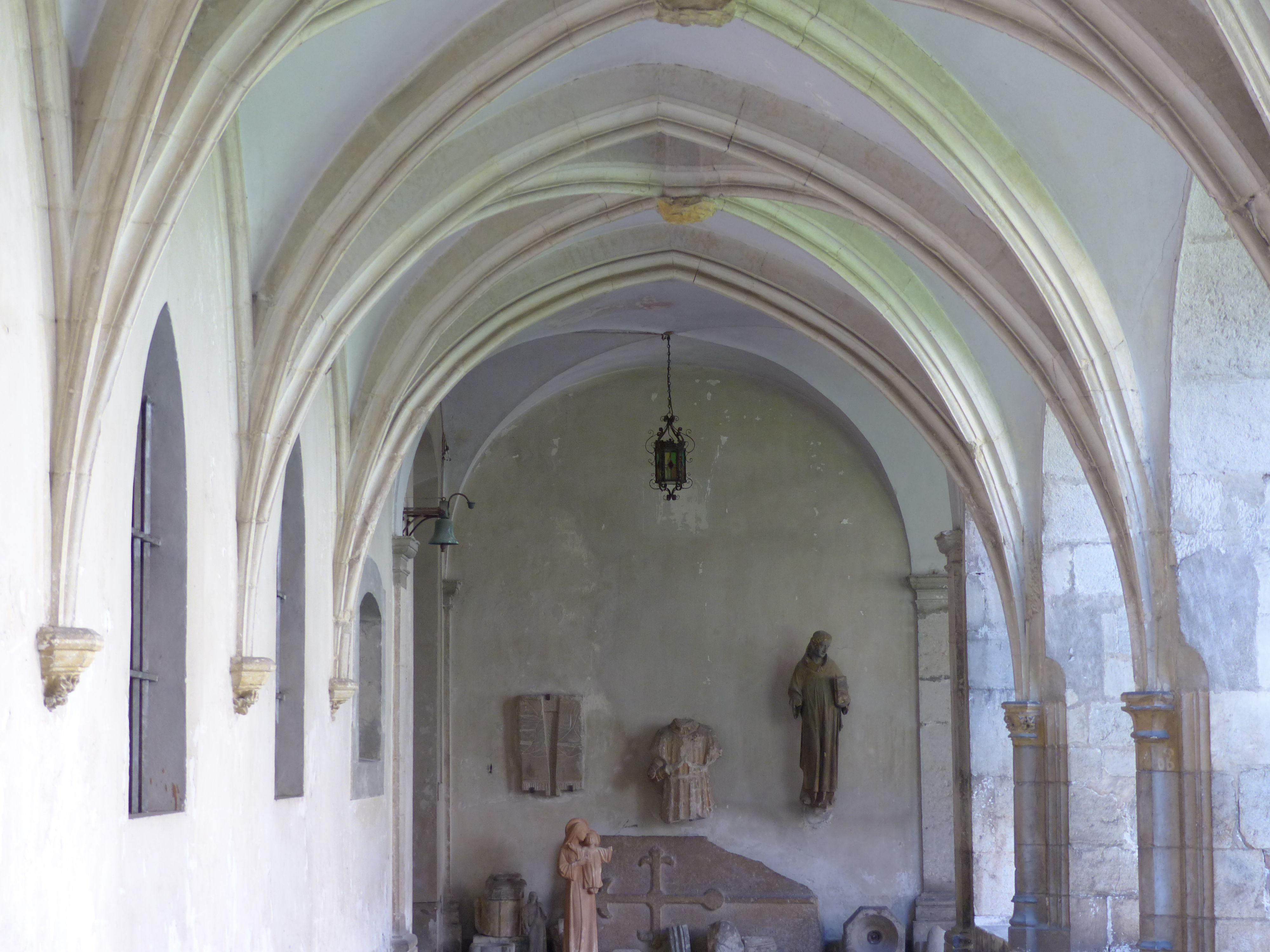 Cloître de l'abbaye d'Hautecombe